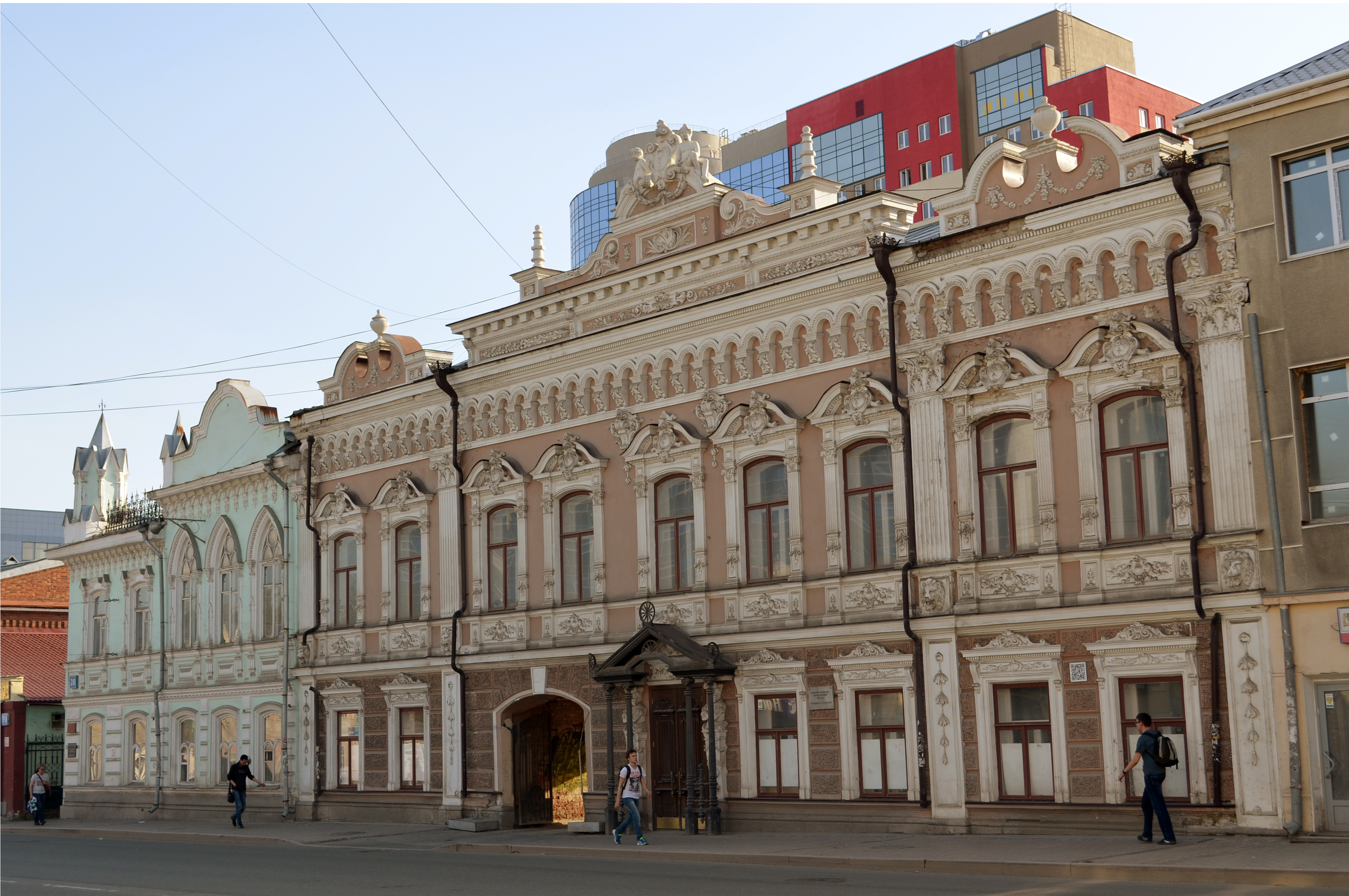 Дом городского головы Симанова (Свердловская область, Екатеринбург, улица Попова, 4)